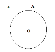 Дотична до кола